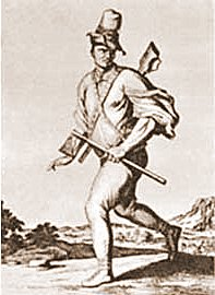 Tołhaj - zbójnik